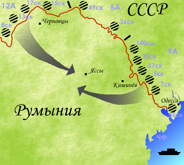 Оперативный план Бессарабско-Буковинского похода РККА 1940 года